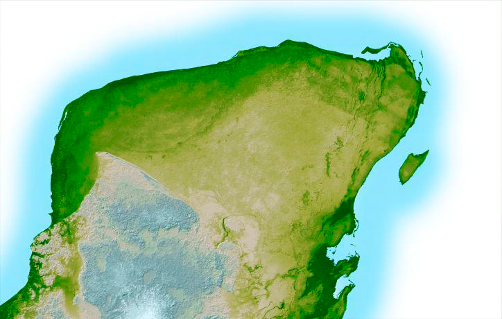 Péninsule du Yucatan. Image de la NASA [1]